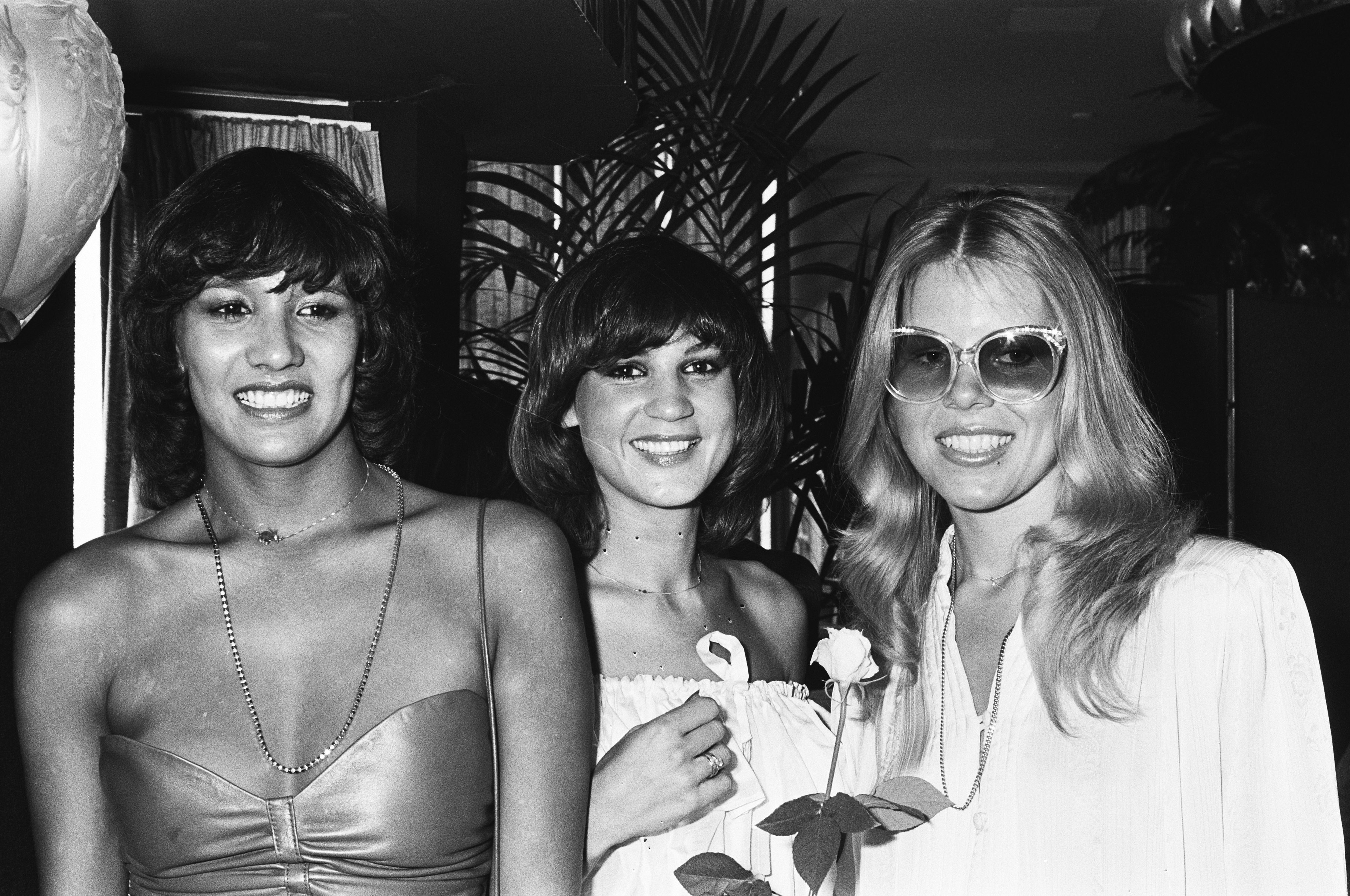 Collectie / Archief : Fotocollectie Anefo Reportage / Serie : Groep "Luv" krijgt gouden platen uit handen van Rijk de Gooyer Beschrijving : V.l.n.r. Patty, Jose en Marga (close) Datum : 15 mei 1979 Trefwoorden : grammofoonplaten, groepsportretten, onderscheidingen Persoonsnaam : Brard, Patty, Gooyer, Rijk de, Hoebee, José, Scheide, Marga Fotograaf : Dijk, Hans van / Anefo Auteursrechthebbende : Nationaal Archief Materiaalsoort : Negatief (zwart/wit) Nummer archiefinventaris : bekijk toegang 2.24.01.05 Bestanddeelnummer : 930-2664 Reacties Geplaatst door Maaike op 13 oktober 2012 - 19:30. Locatie: het Lido te Amsterdam